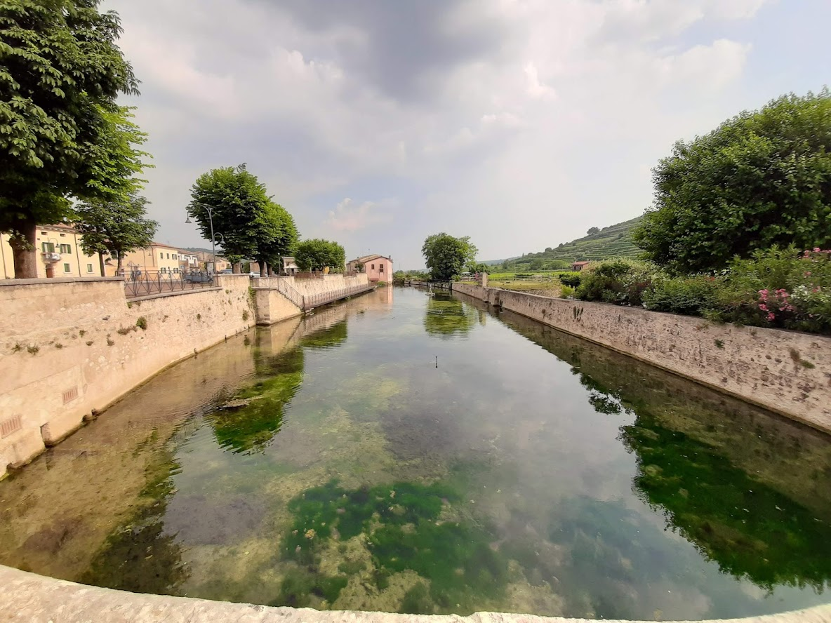 Sorgente del fiume Tramigna, denominata lago della Mora (popolarmente "Fontana") - Comune di Cazzano di Tramigna (VR).